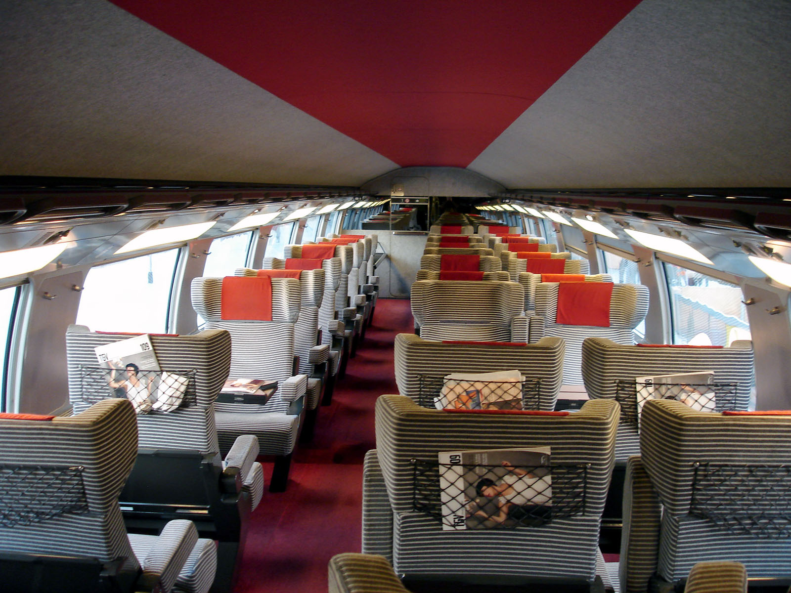 Salle haute d'une voiture de 1ère classe d'un TGV Duplex, France.